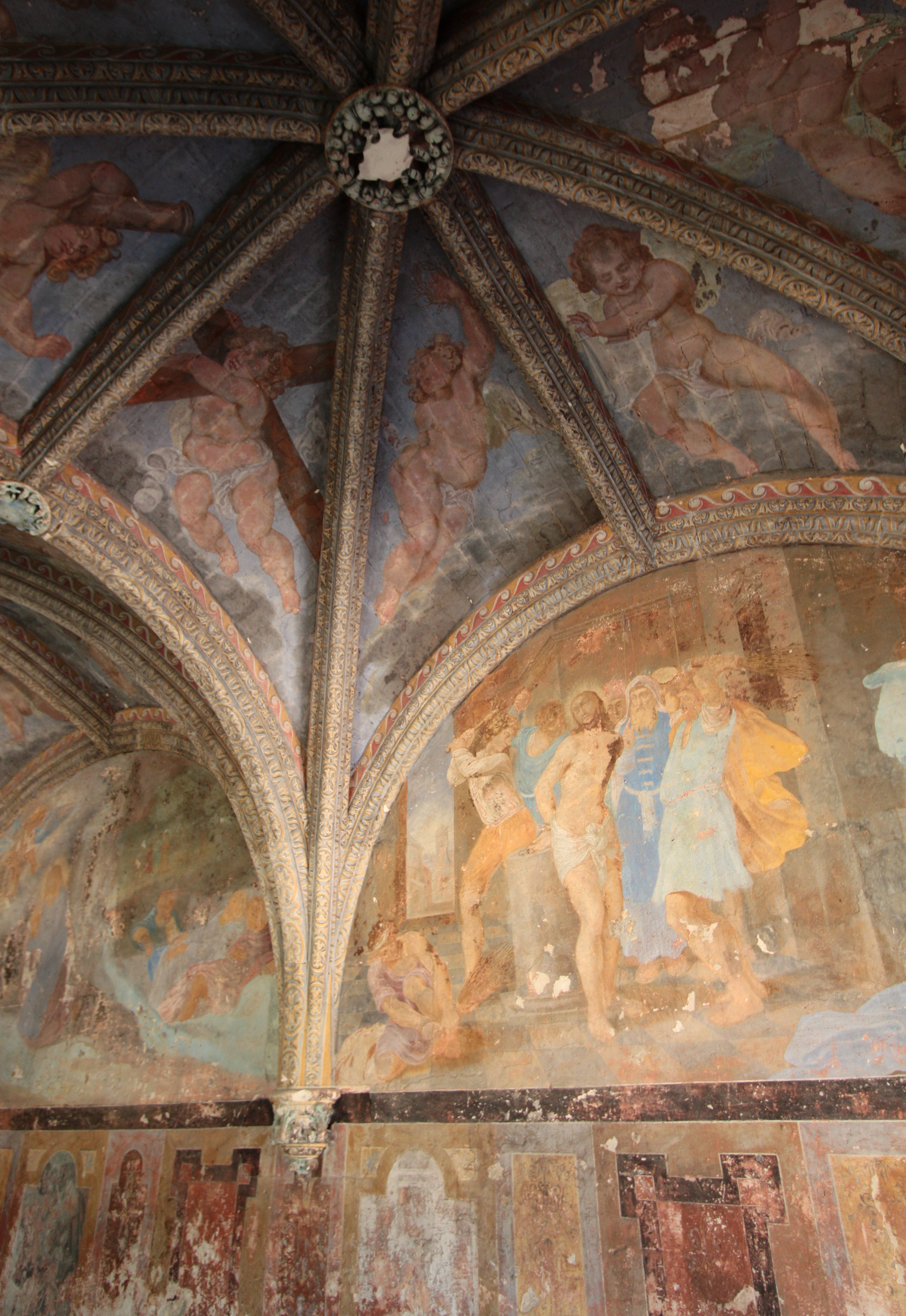 Schloss Villesavin, Département Loir-et-Cher/Frankreich - Kreuzrippengewölbe und Freskenmalereien der Kapelle im nordöstlichen Pavillon